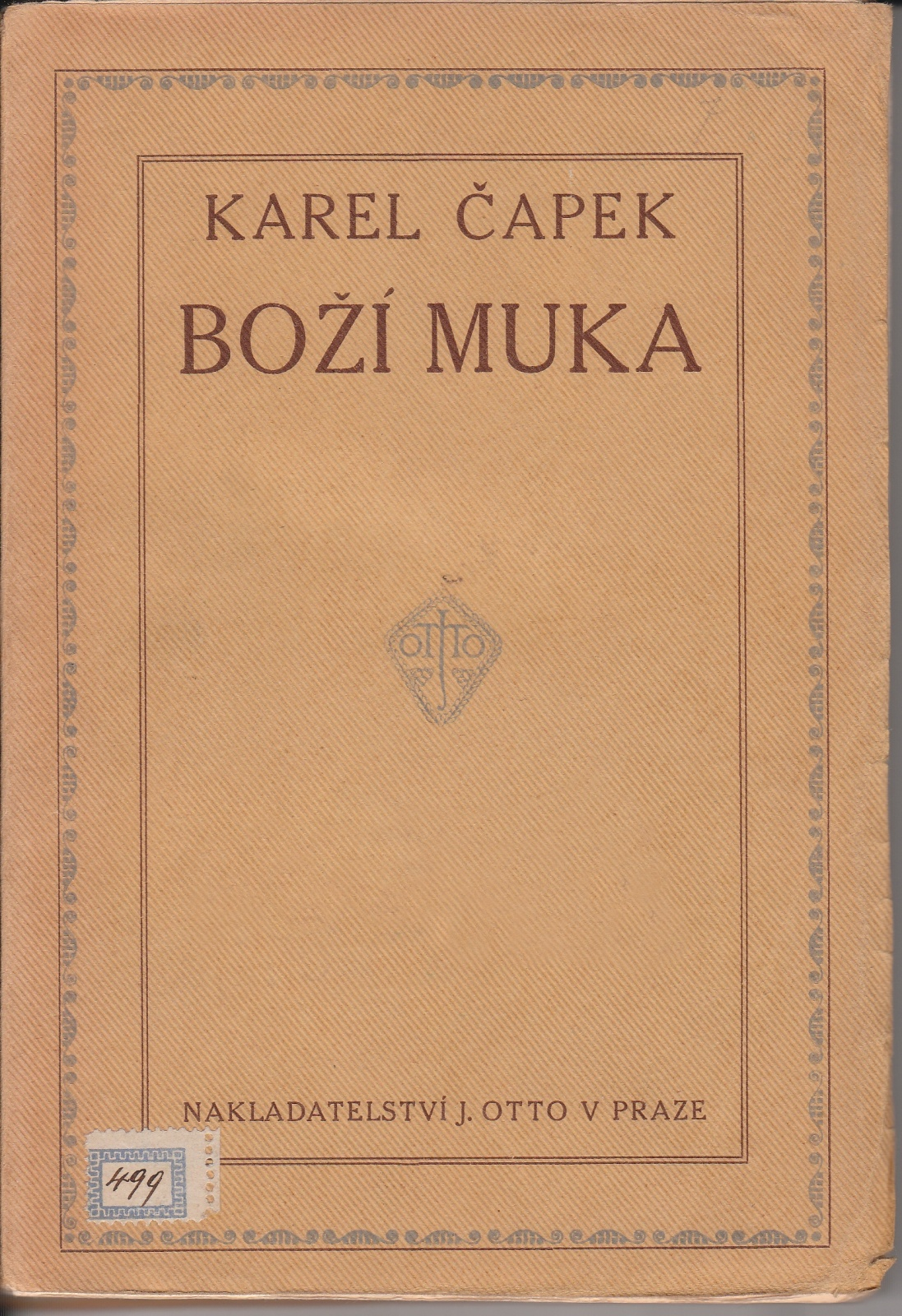 Karel Čapek: Boží muka : kniha novel,obálka prvního vydání, Nakladatelství Jan Otto, Praha, 1917